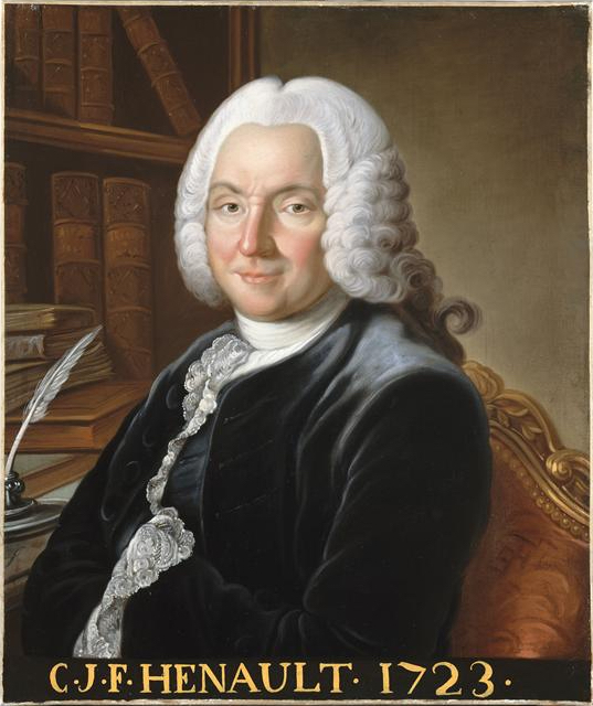 Président du parlement de Paris, surintendant de la Maison de la reine Marie Leszczynska